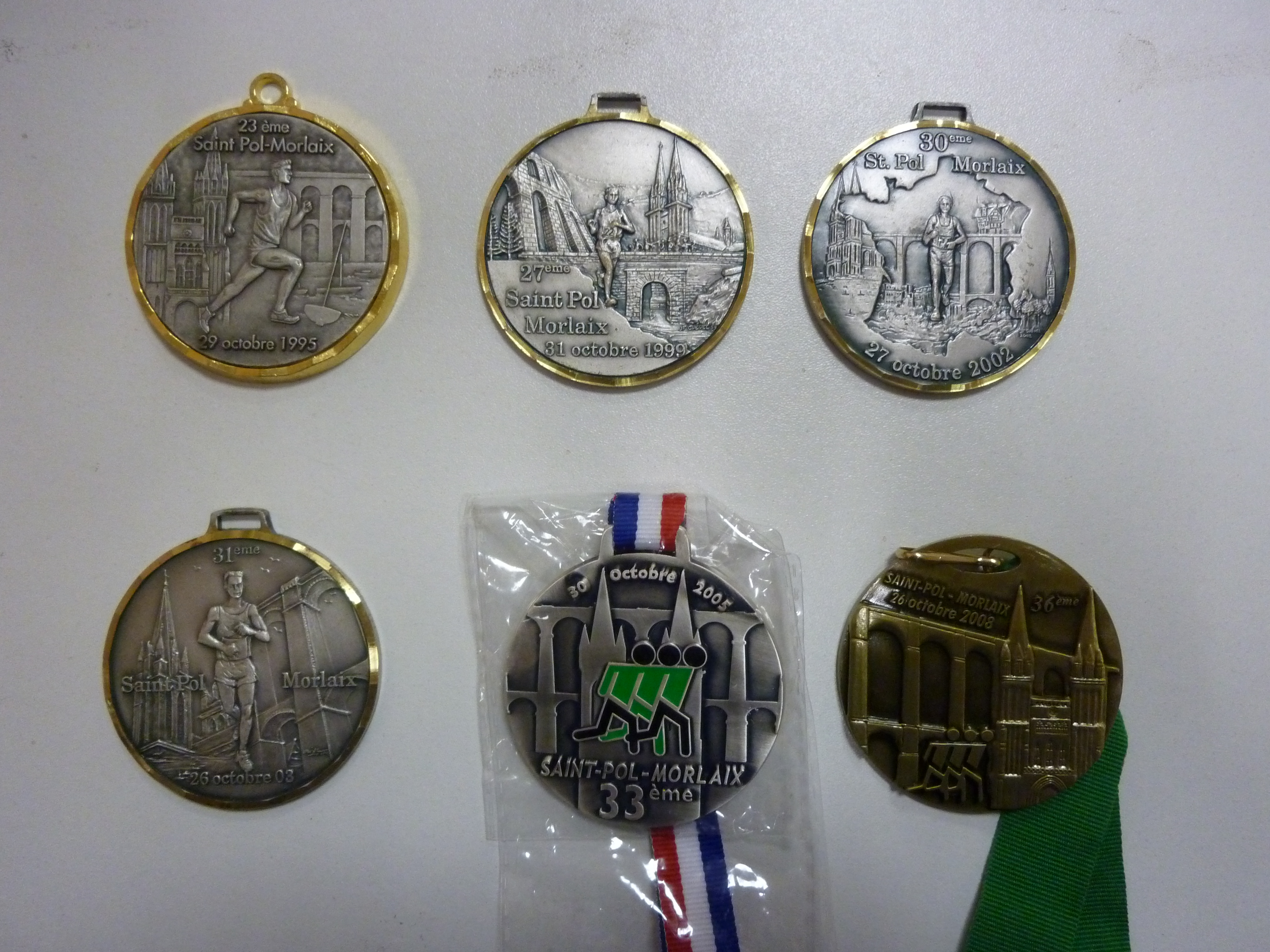 Série de médailles de la course Saint-Pol-de-Léon/Morlaix.